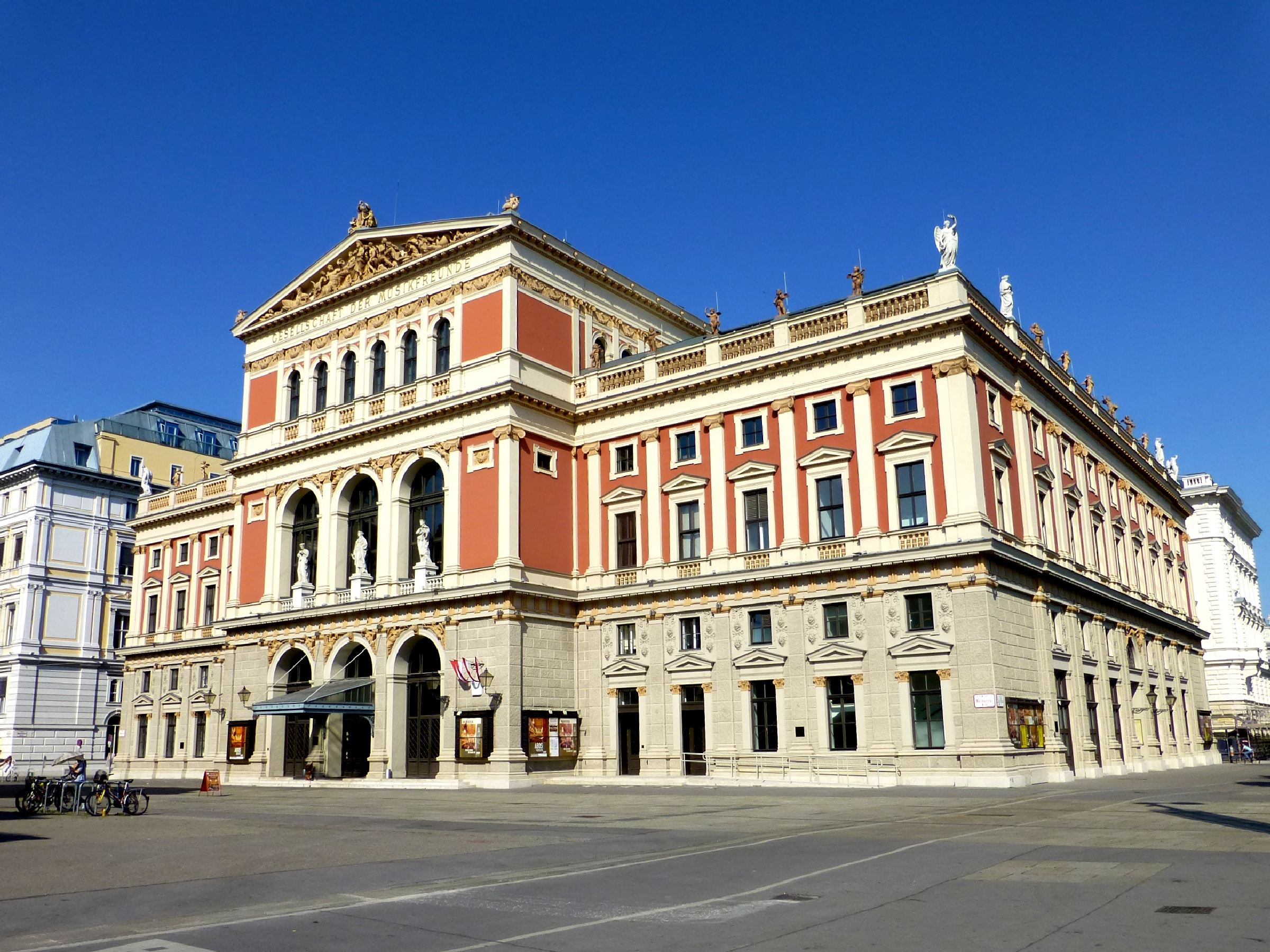 Musikverein Wien Austria